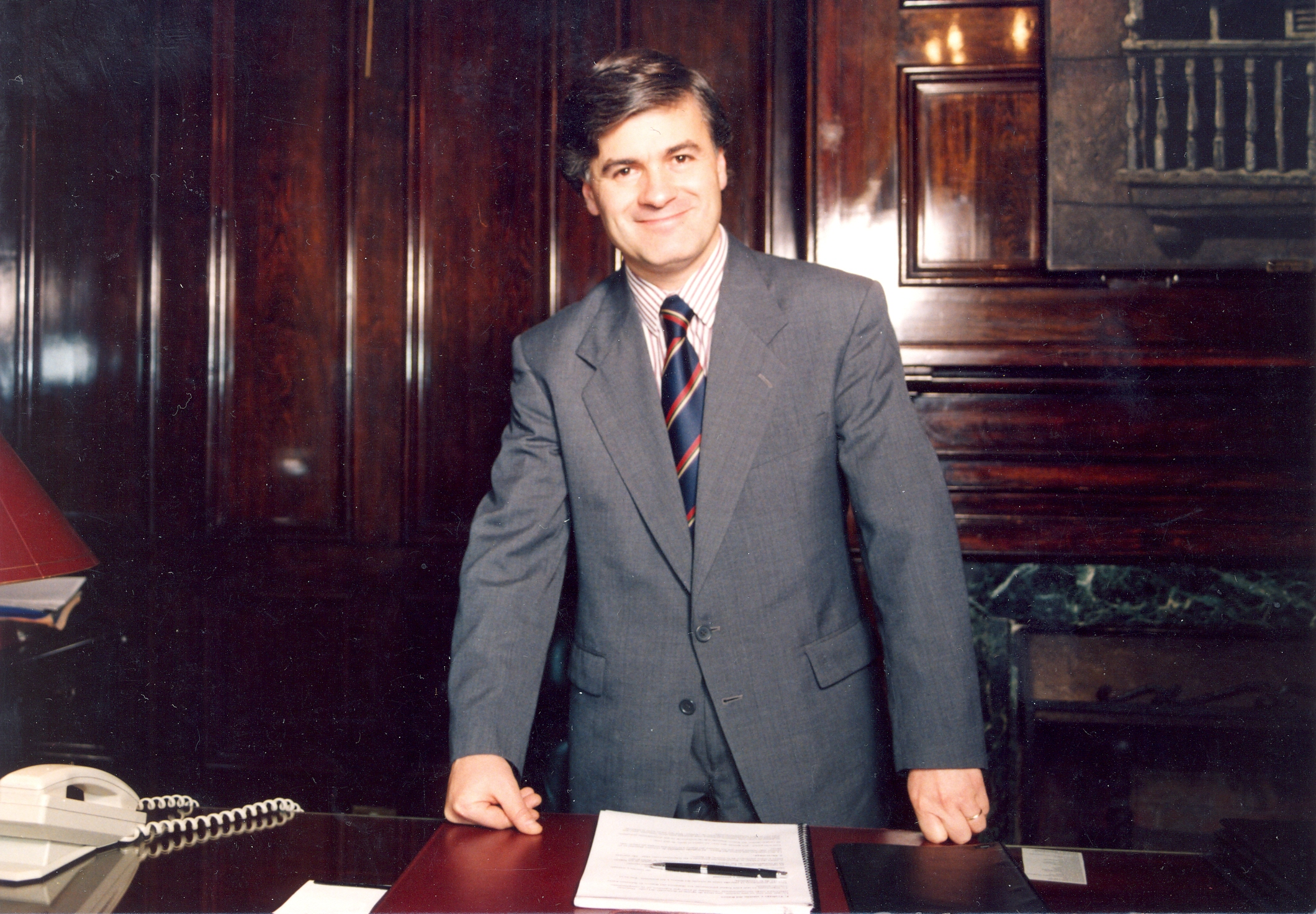 Ex ministro de Economía de Chile y ex vicepresidente del Banco Central de Chile